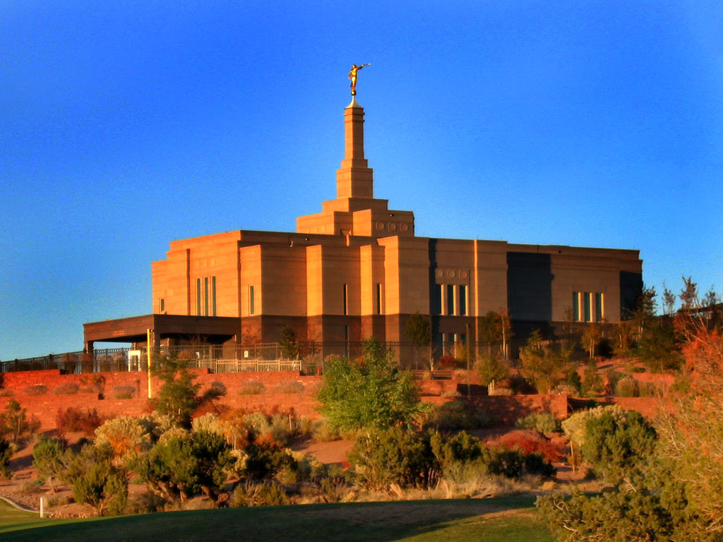 Snowflake Arizona Temple - © 2006 Mike James